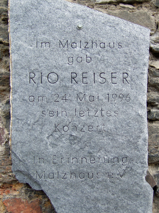 Zur Erinnerung an das letzte Konzert von Rio Reiser; Malzhaus, Plauen/Vogtland